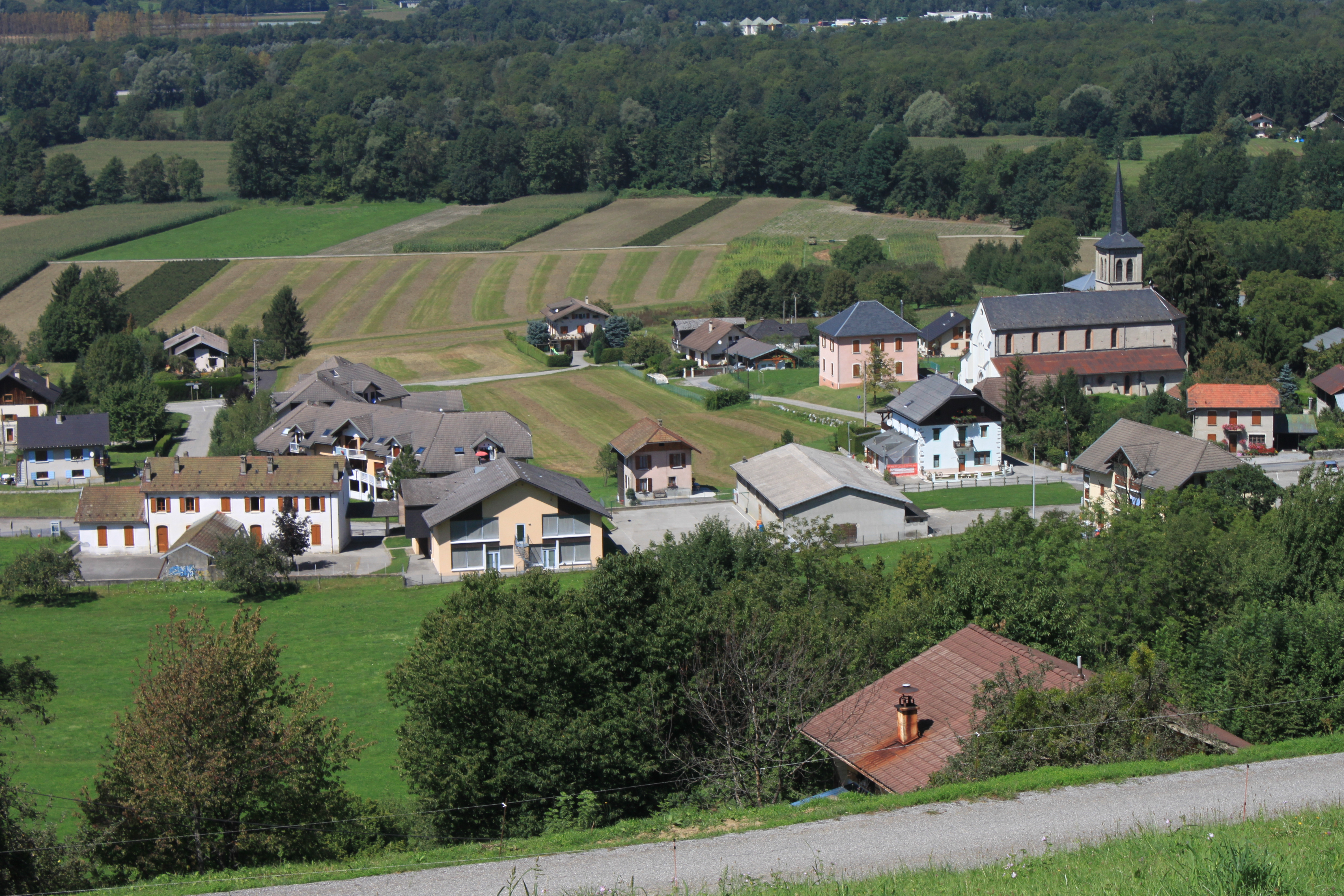 Notre-Dame-des-Millières